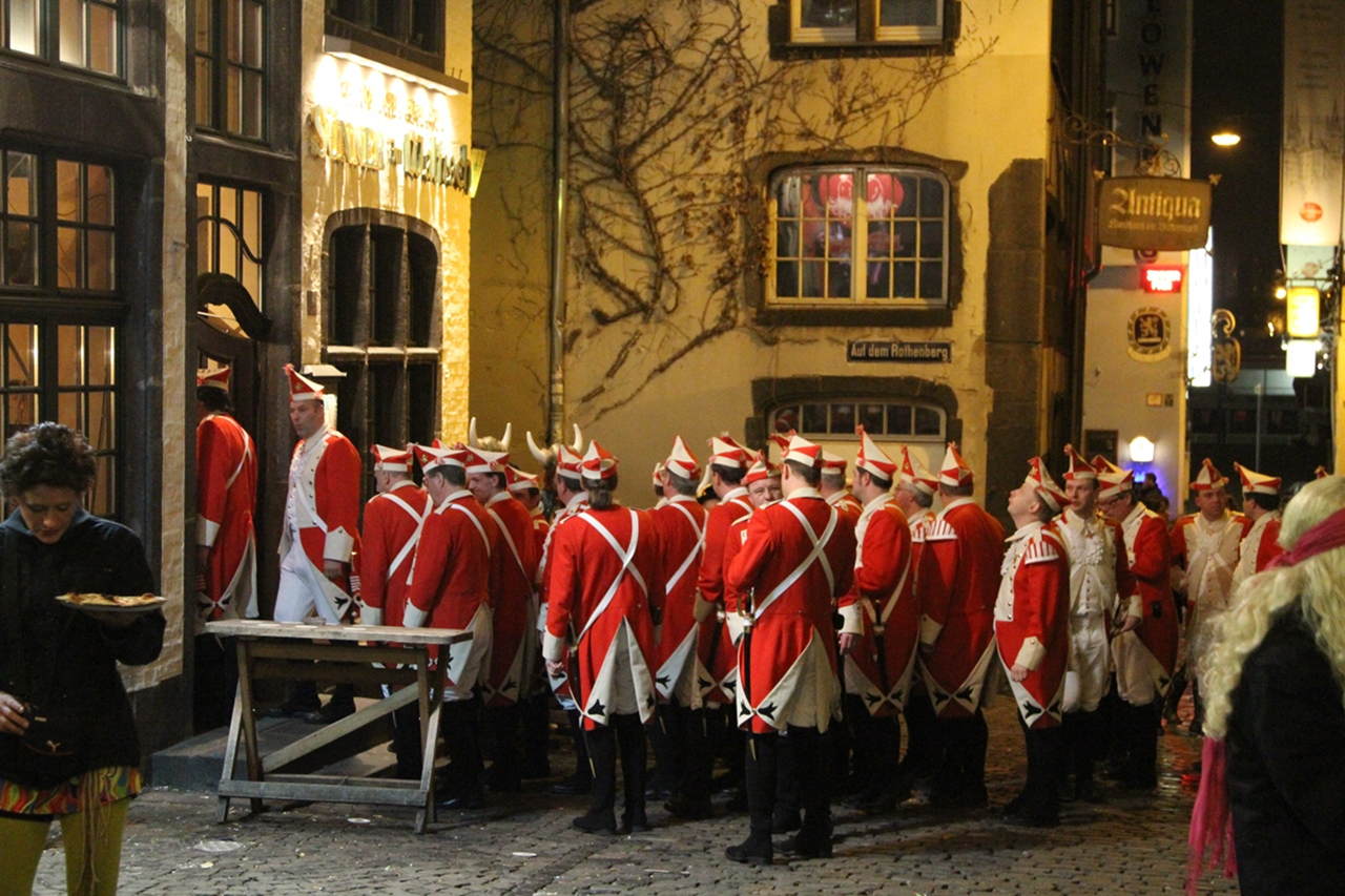 Kölner Straßenkarneval in der Altstadt